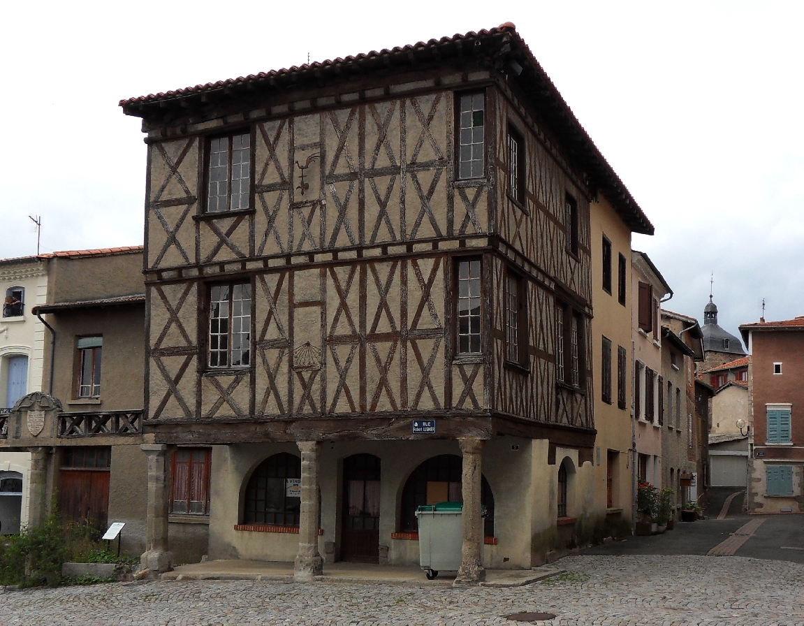 Maison en bois